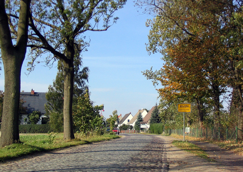 Ortseingang Altefähr (Bergener Straße). Dieses Bild zeigt den Ortseingang von der Bahnhof Straße.